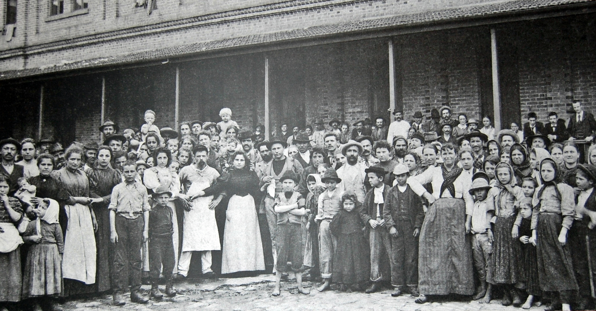 Imigrantes europeus posando para fotografia no pátio central da Hospedaria dos Imigrantes de São Paulo.